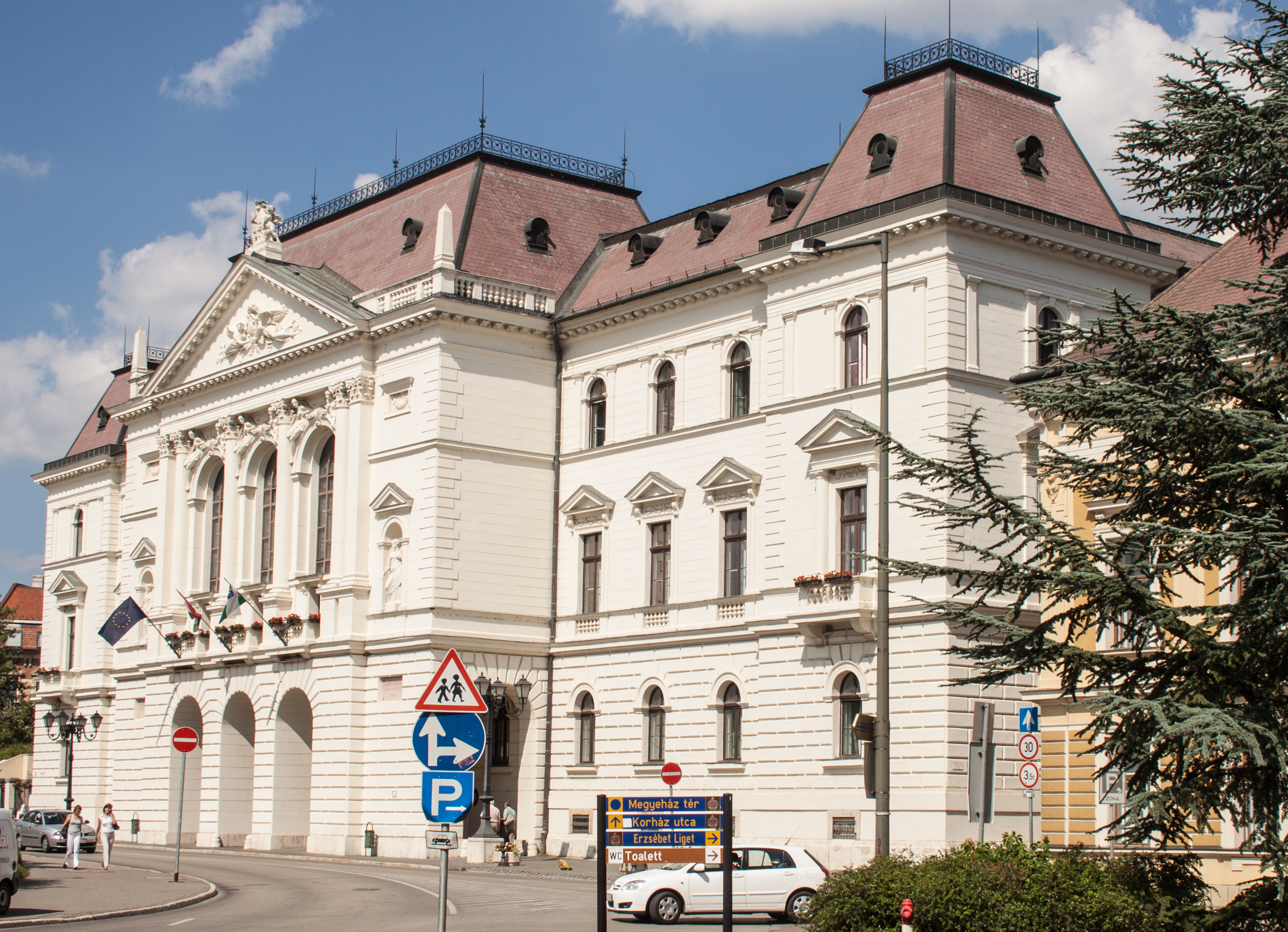 Megyeháza, Veszprém